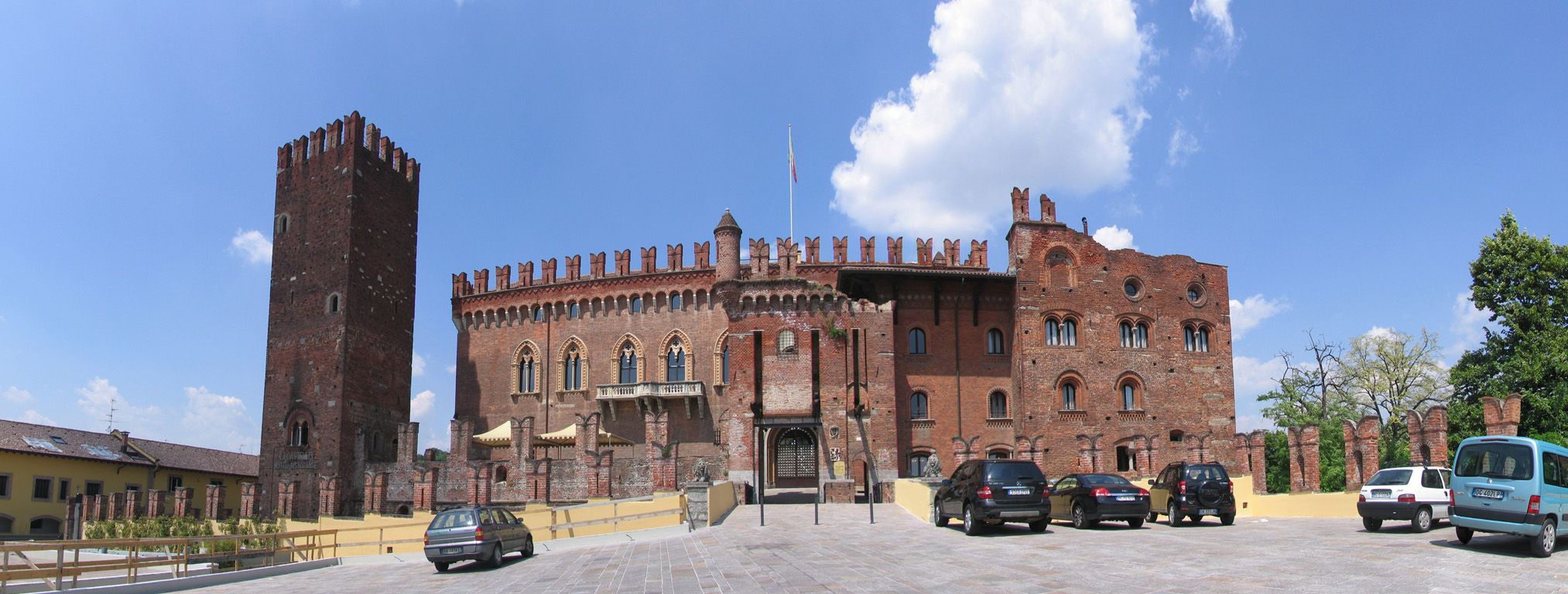 Castello - Carimate 06/2009